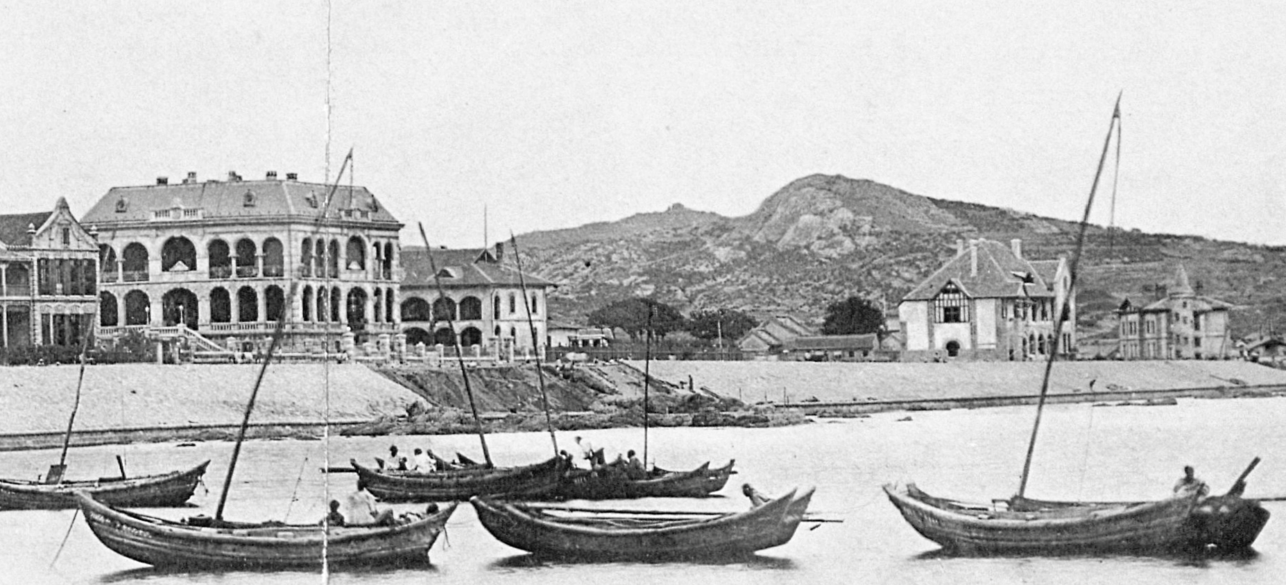 青岛太平路德租时期02